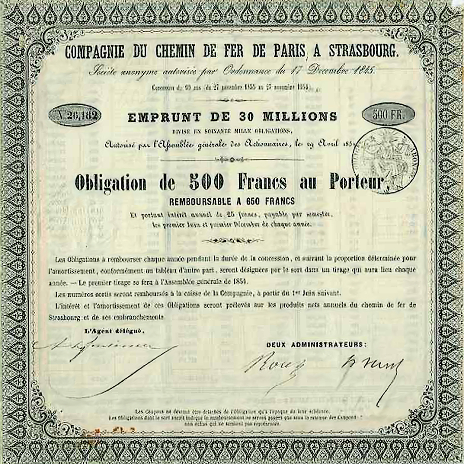 500-Fr.-Aktie Compagnie du chemin de fer de Paris à Strasbourg